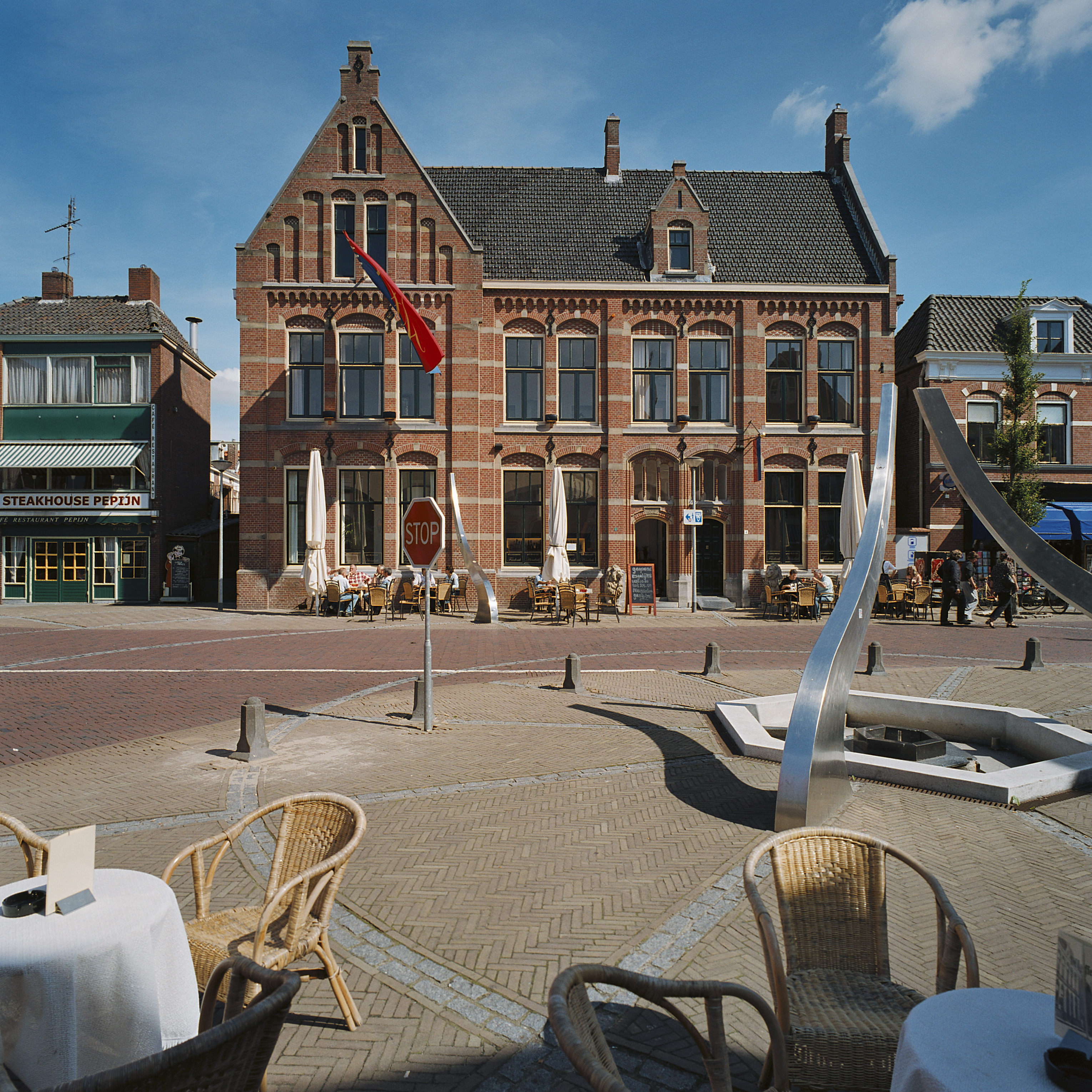 Postkantoren: Overzicht voorgevel vanaf de Markt